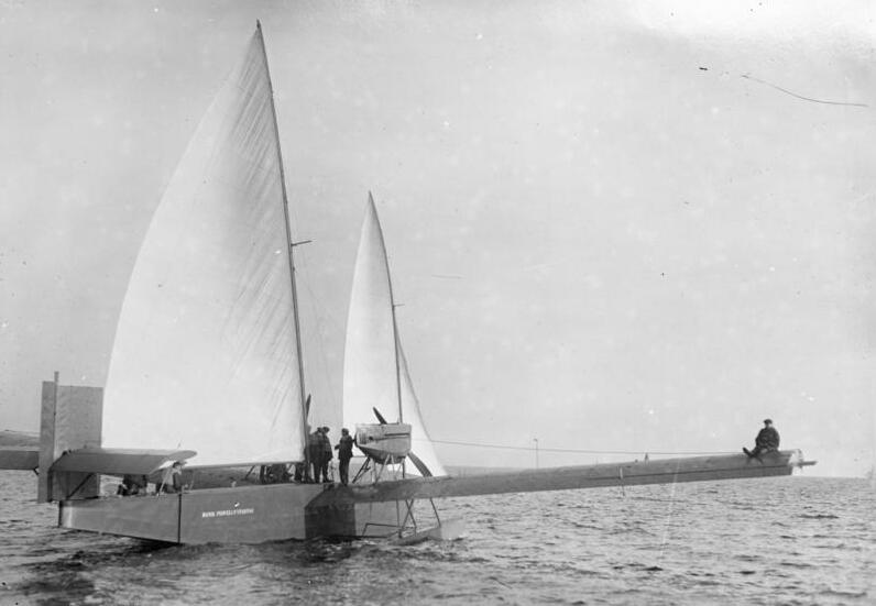 Ein deutsches Wasserflugzeug mit Segeln! Bei Notlandungen auf dem Wasser setzt das Flugzeug Segel und kann sich auf diese Art in einen Hafen retten.